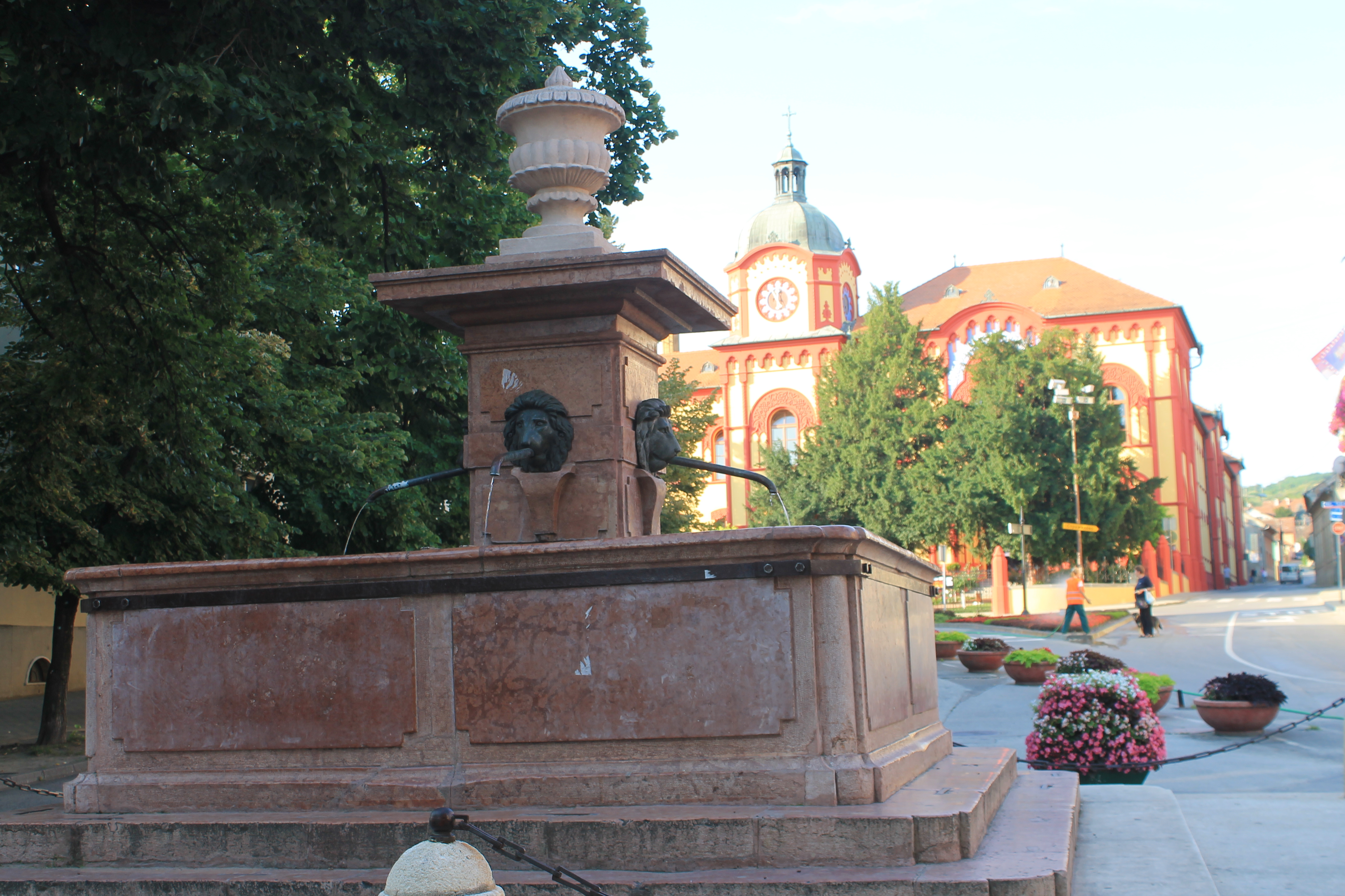 Česma Četiri lava